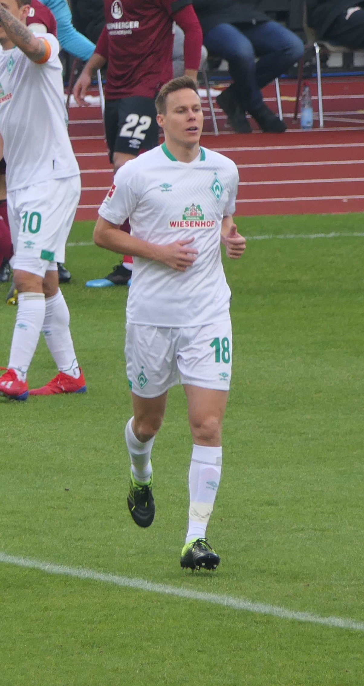 Der Fussballprofi Niklas Moisander im Trikot vom SV Werder Bremen beim Auswärtsspiel gegen den 1.FC Nürnberg am 02.02.2019.